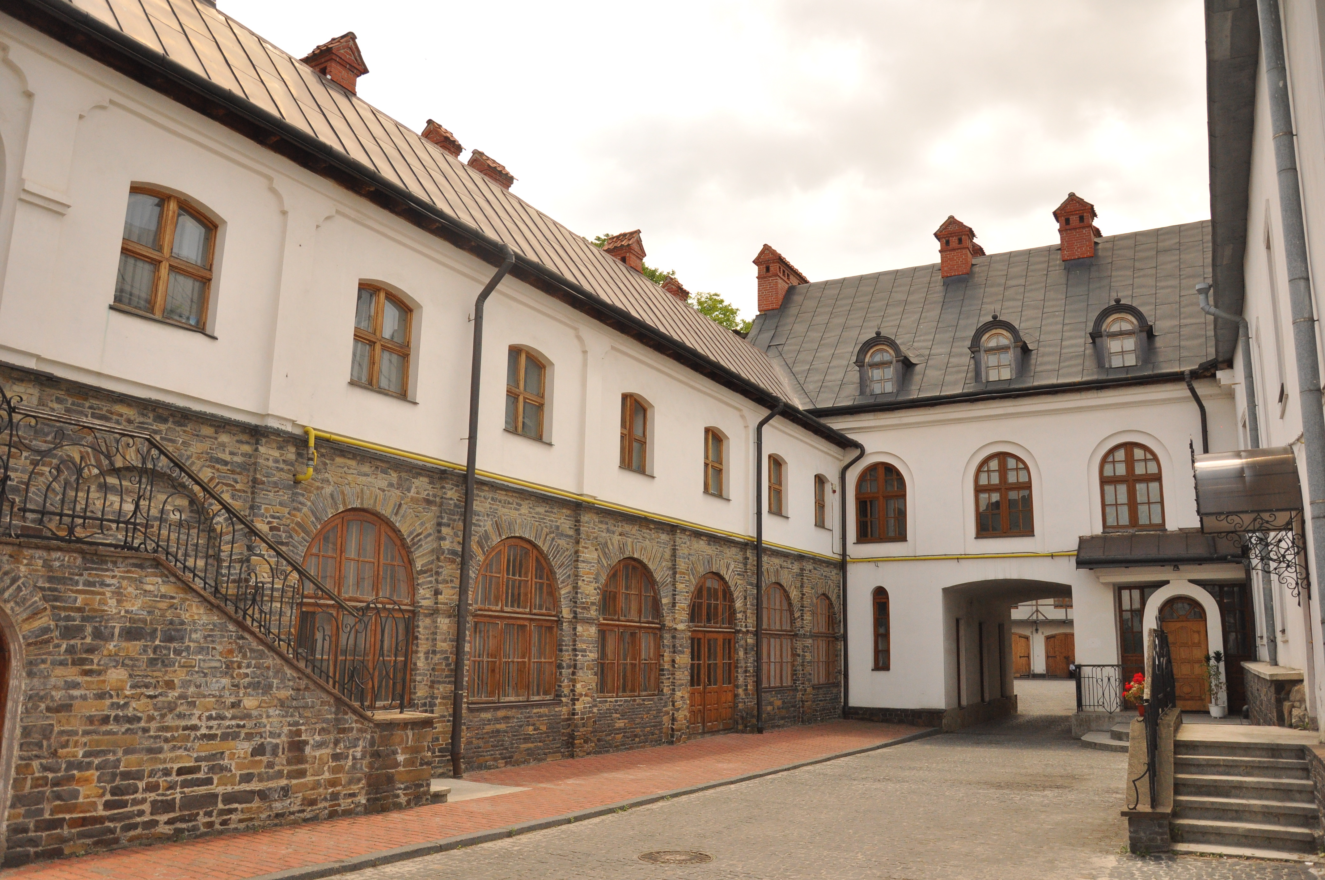 Двор монастыря св. Онуфрия во Львове